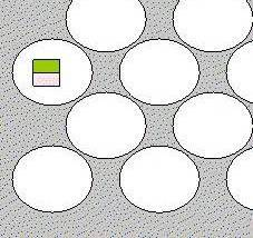 Lasca (juego) posición 1